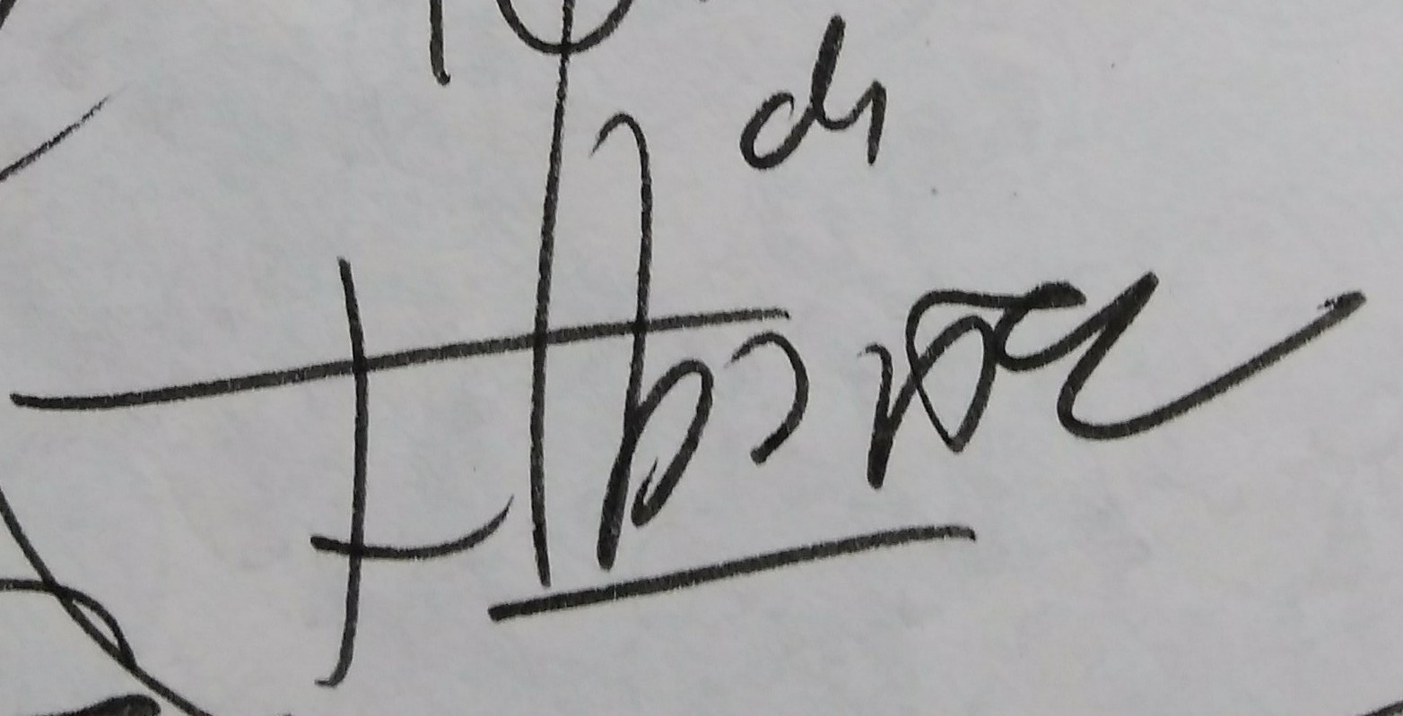 Firma de Francisco Ibáñez en una dedicatoria. Se puede leer "de F Ibáñez"